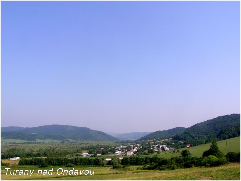 DescriptionCelkový pohľadDate25 June 2006SourceOwn workAuthorAndrej BelovežčíkPermission (Reusing this file) anoCelkový pohľad